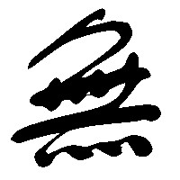 無